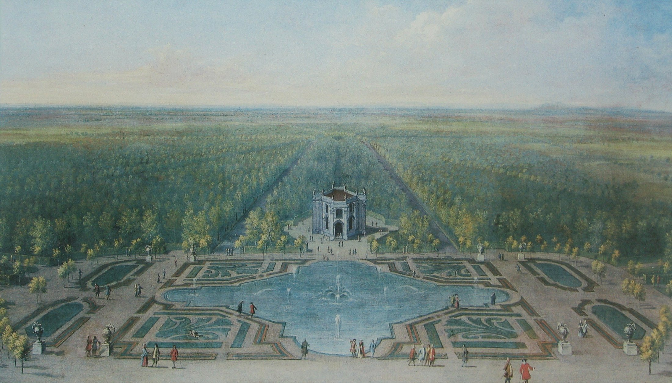 Franz Joachim Beich: Pagodenburg (Nymphenburg), 1722-23